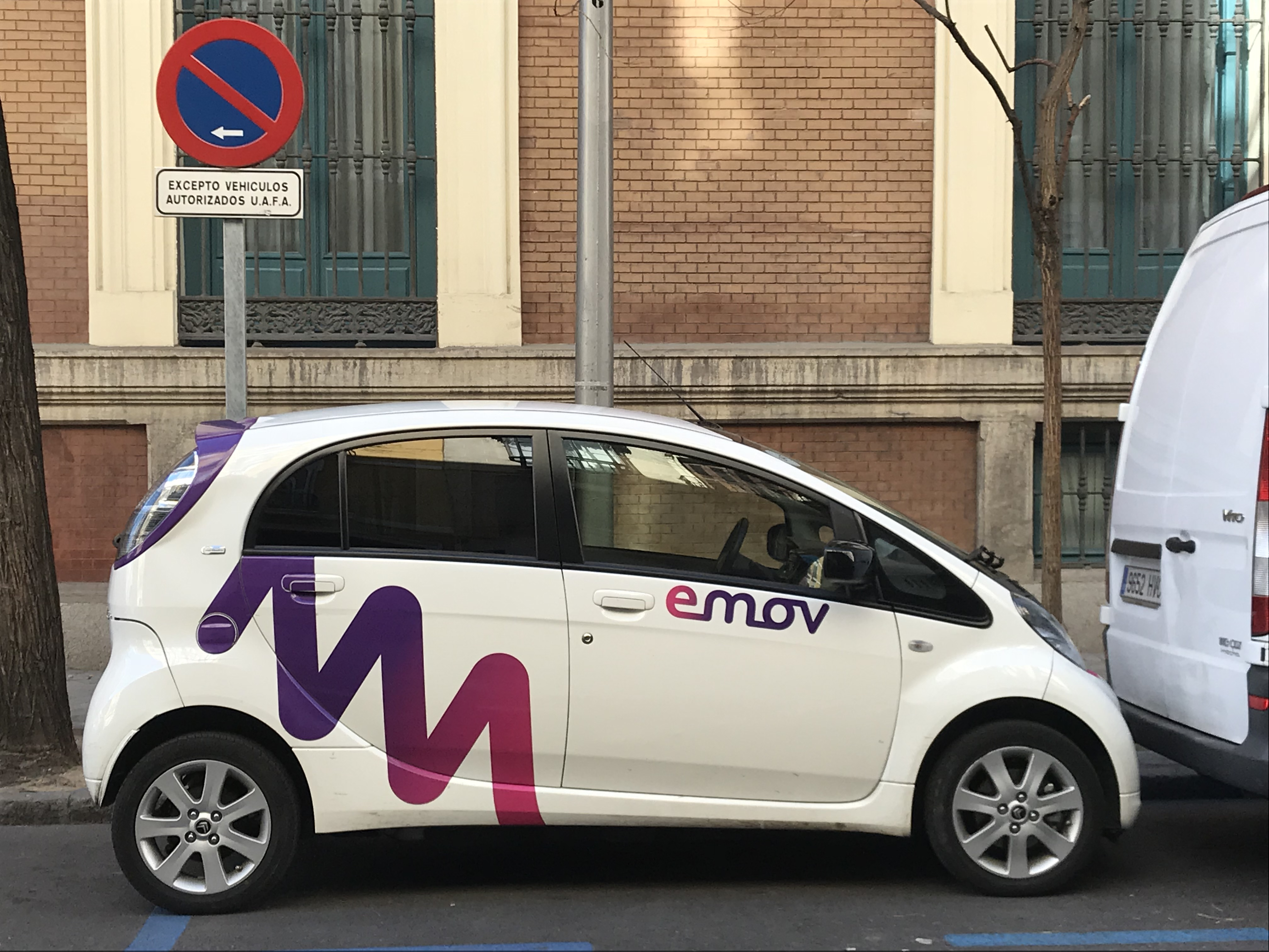 Coche Emov